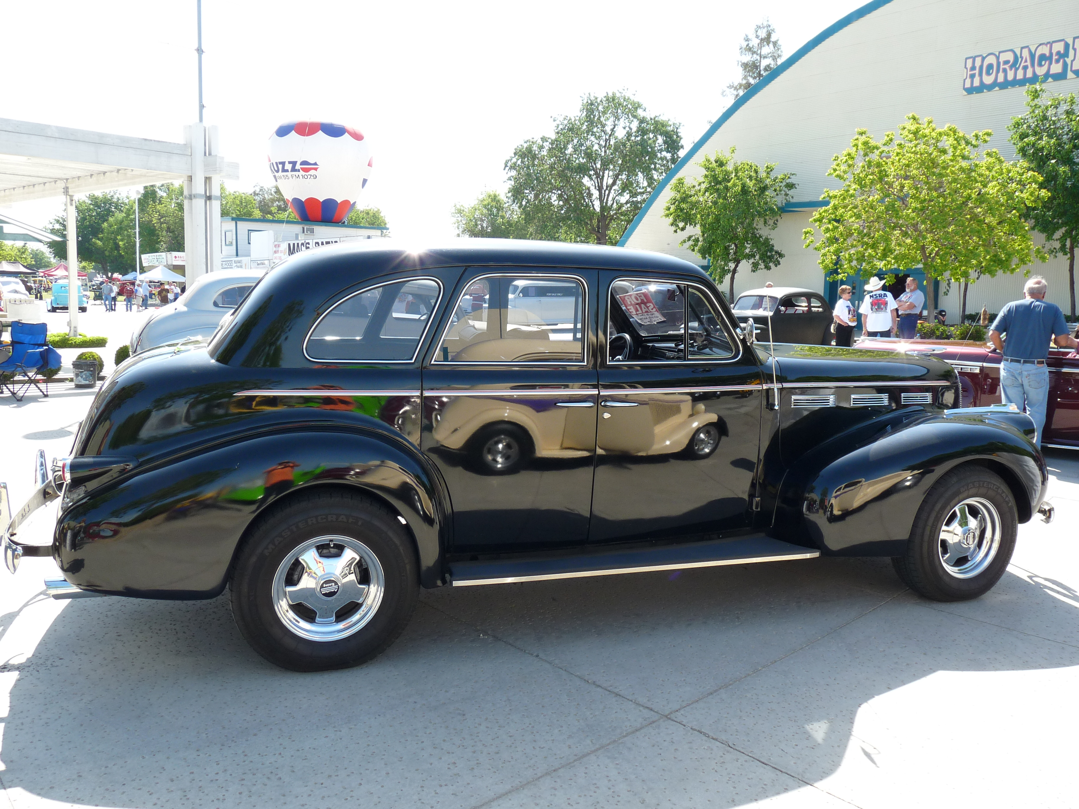 1942 Studebaker President